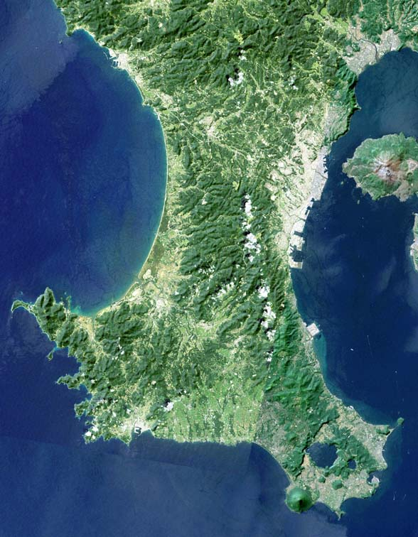 Satsuma Peninsula, Kagoshima, Japan.